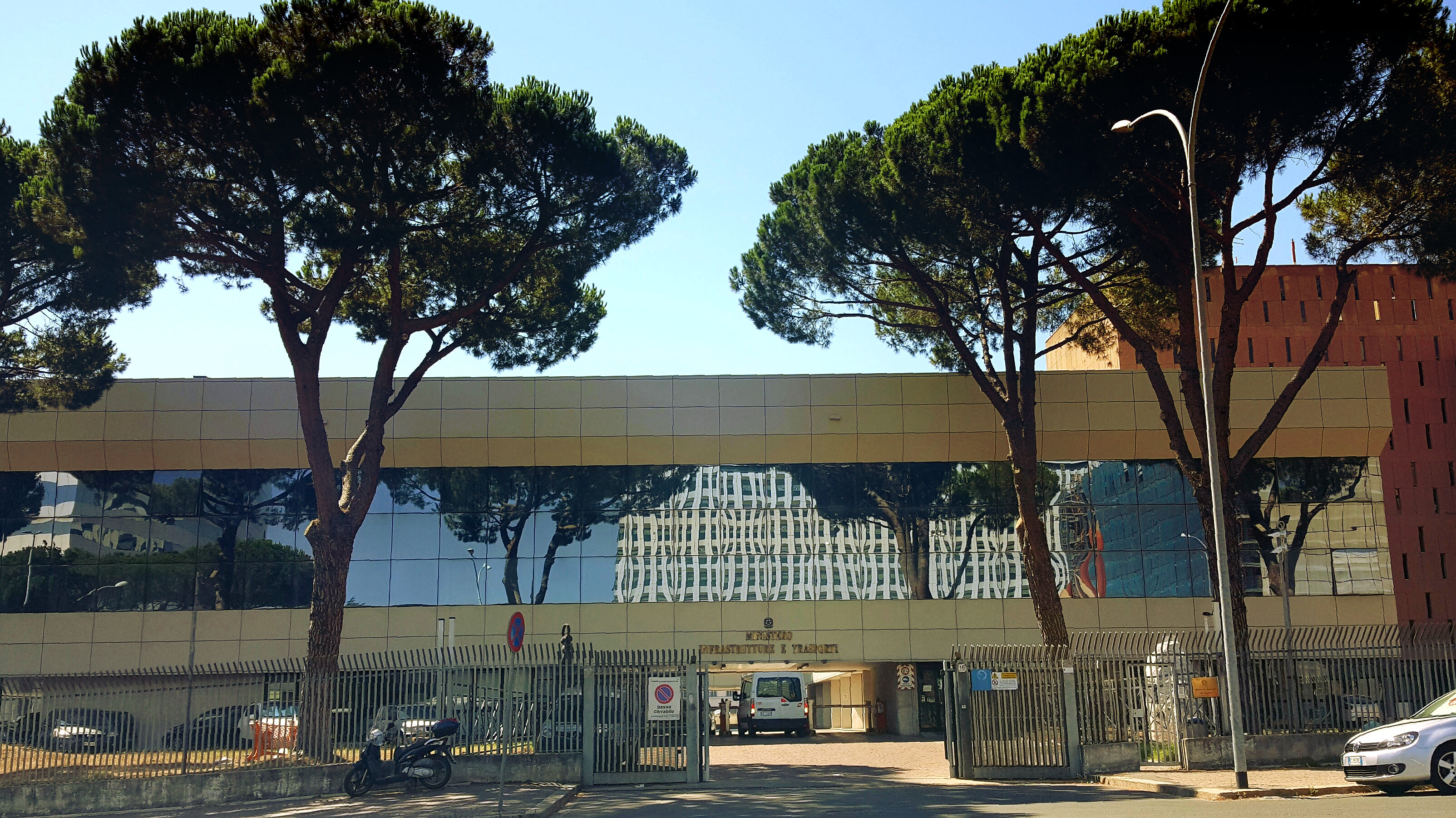 Sede del Ministero delle Infrastrutture e dei Trasporti, Comando generale del Corpo delle Capitanerie di Porto a Roma, via dell'Arte 16